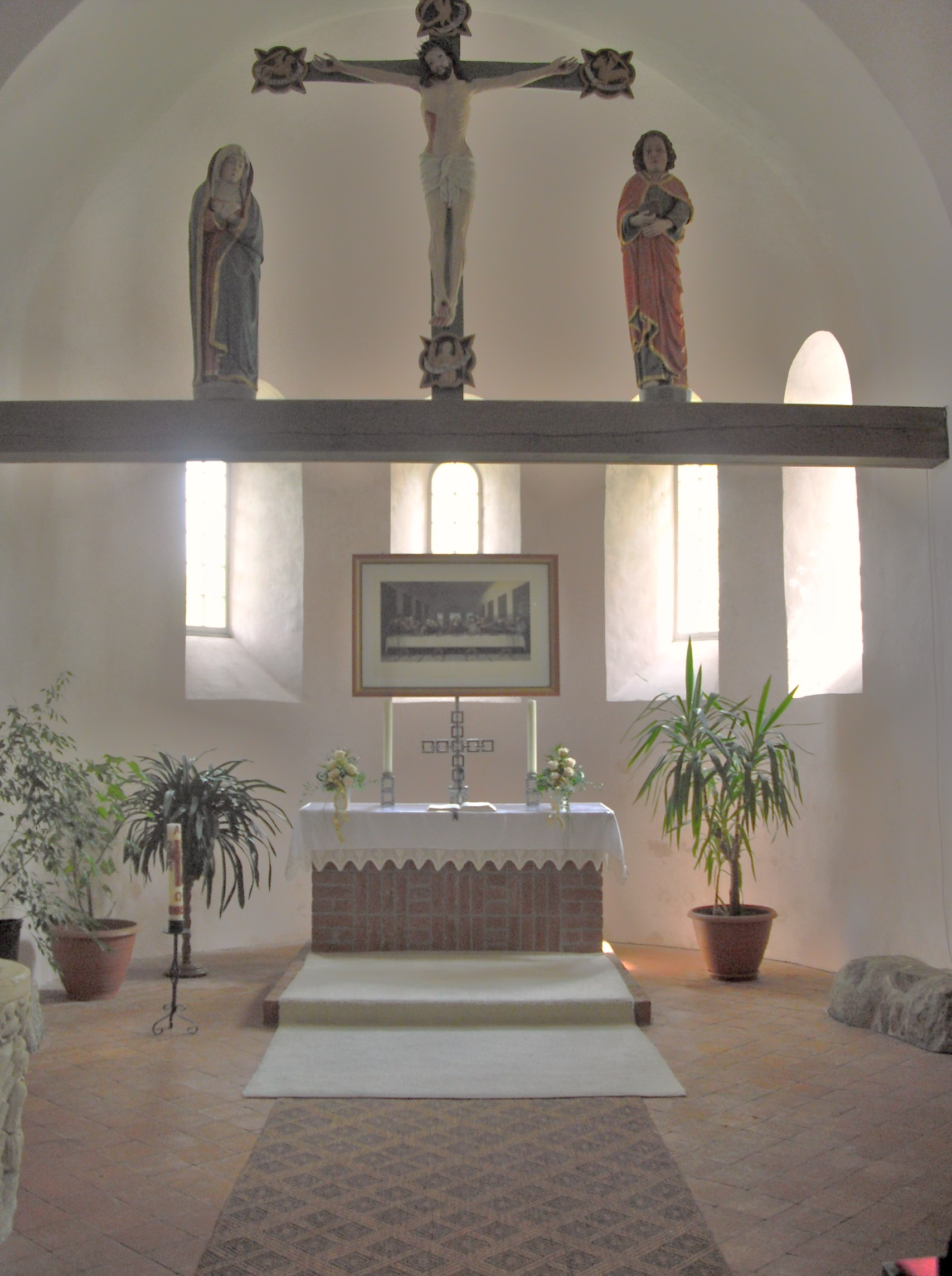 Evangelisch-lutherische Kirche in Middels (Stadtteil von Aurich, Landkreis Aurich, Niedersachsen, Deutschland): Altarraum